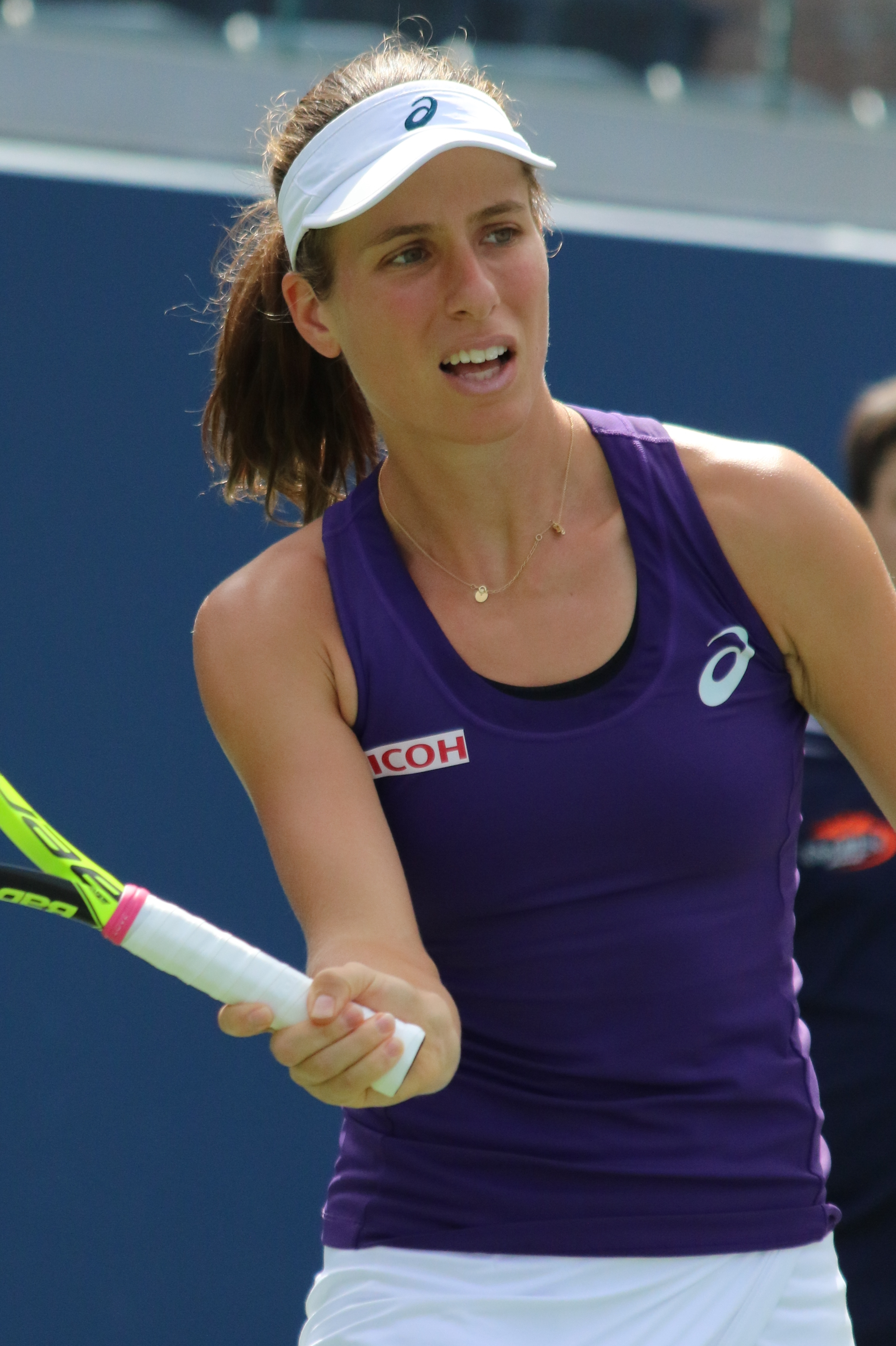 Konta US16 (48)